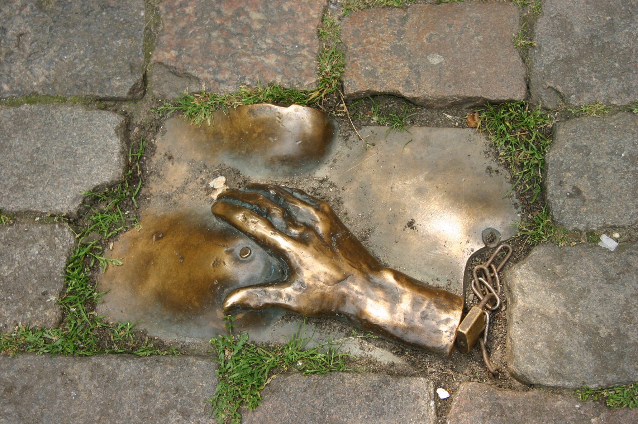 kunstwerk dat in de grond ligt op de Wallen in Amsterdam